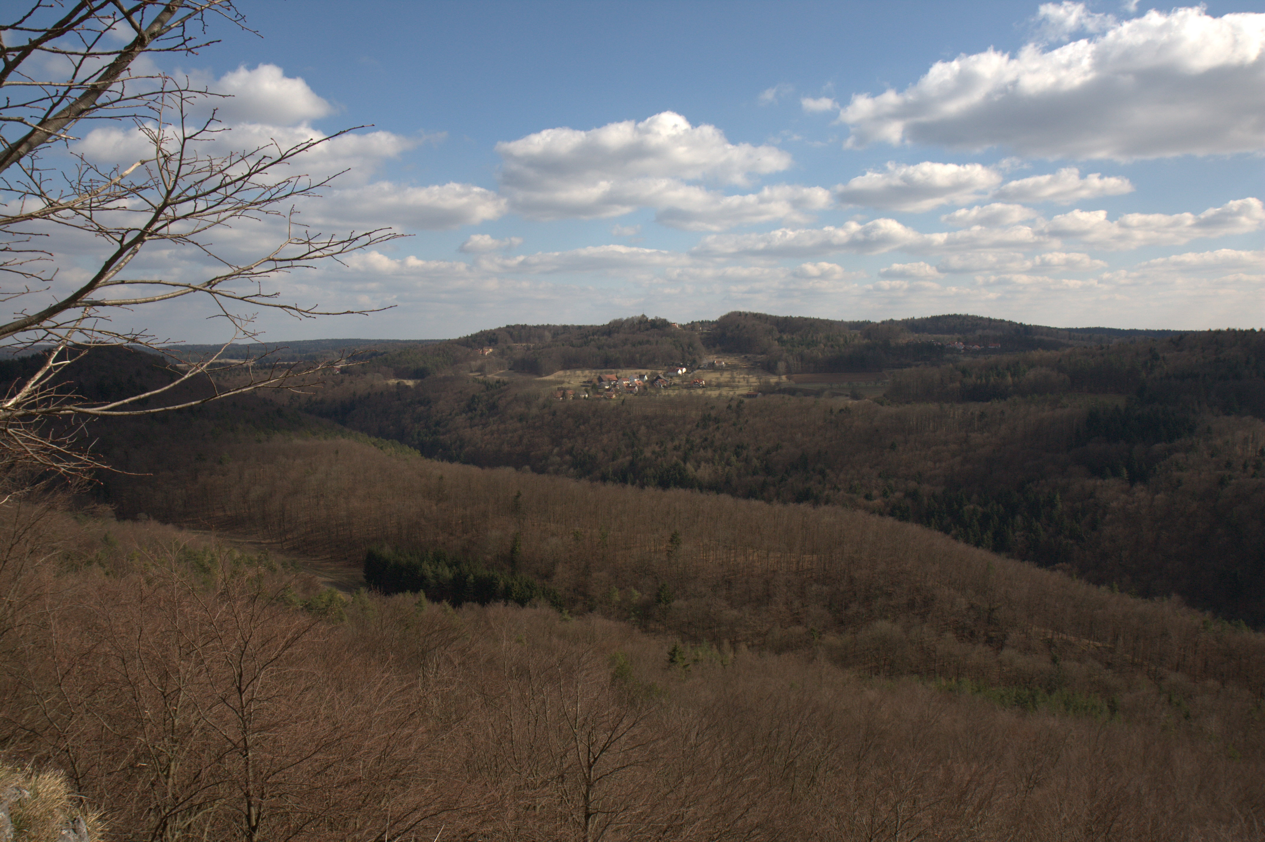 Burgstall Wichsenstein - Ansicht des Burgstalls aus westlicher Richtung